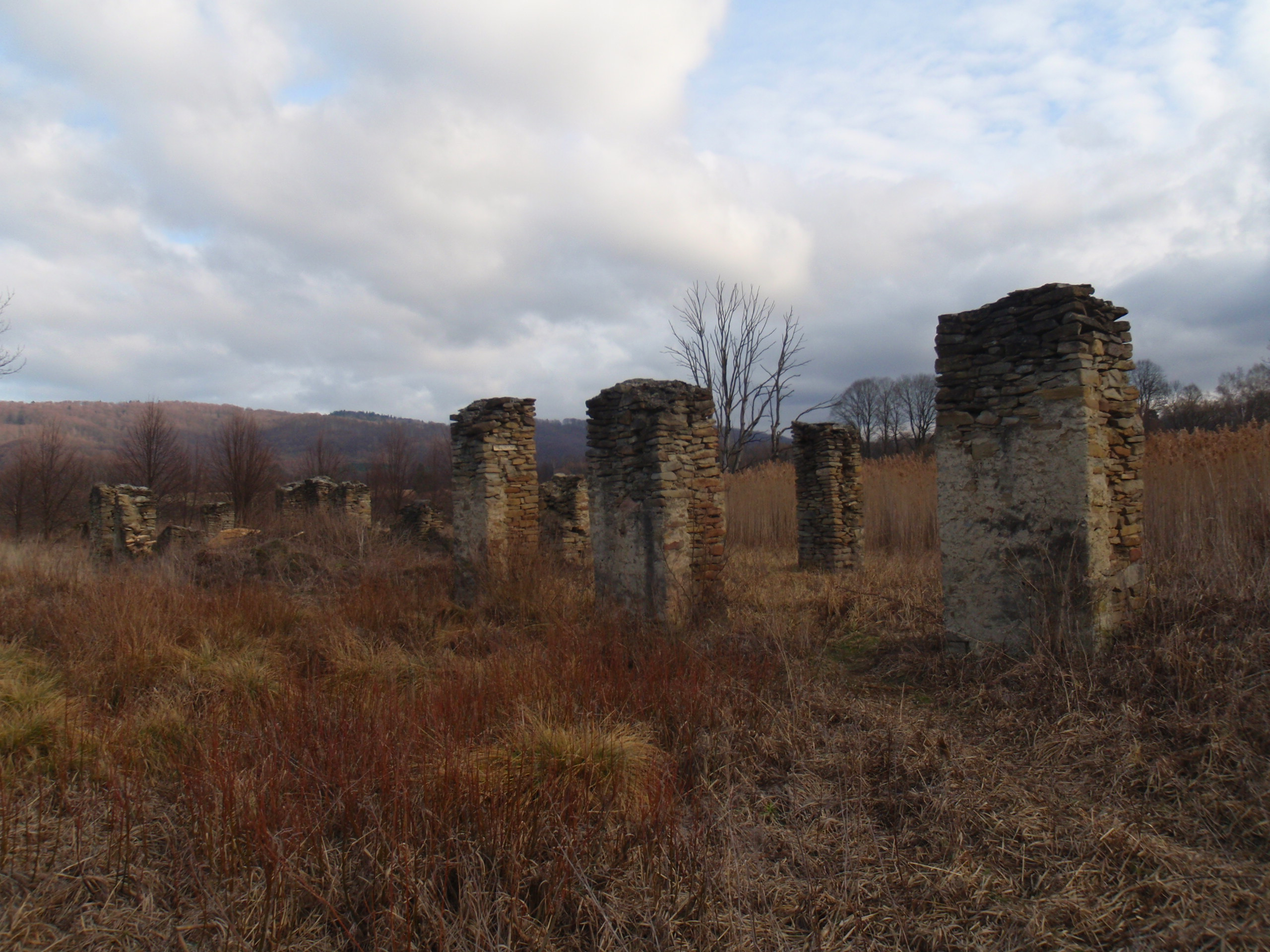 Tworylne - ruiny stodoły dworskiej